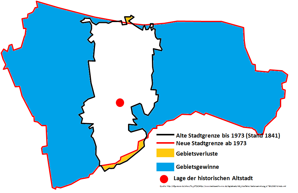 Stadtentwicklung Lübbeckes